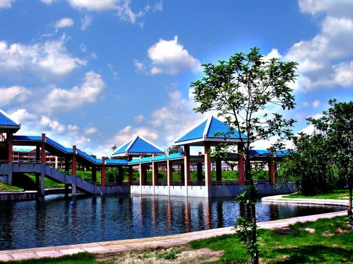 人工湖